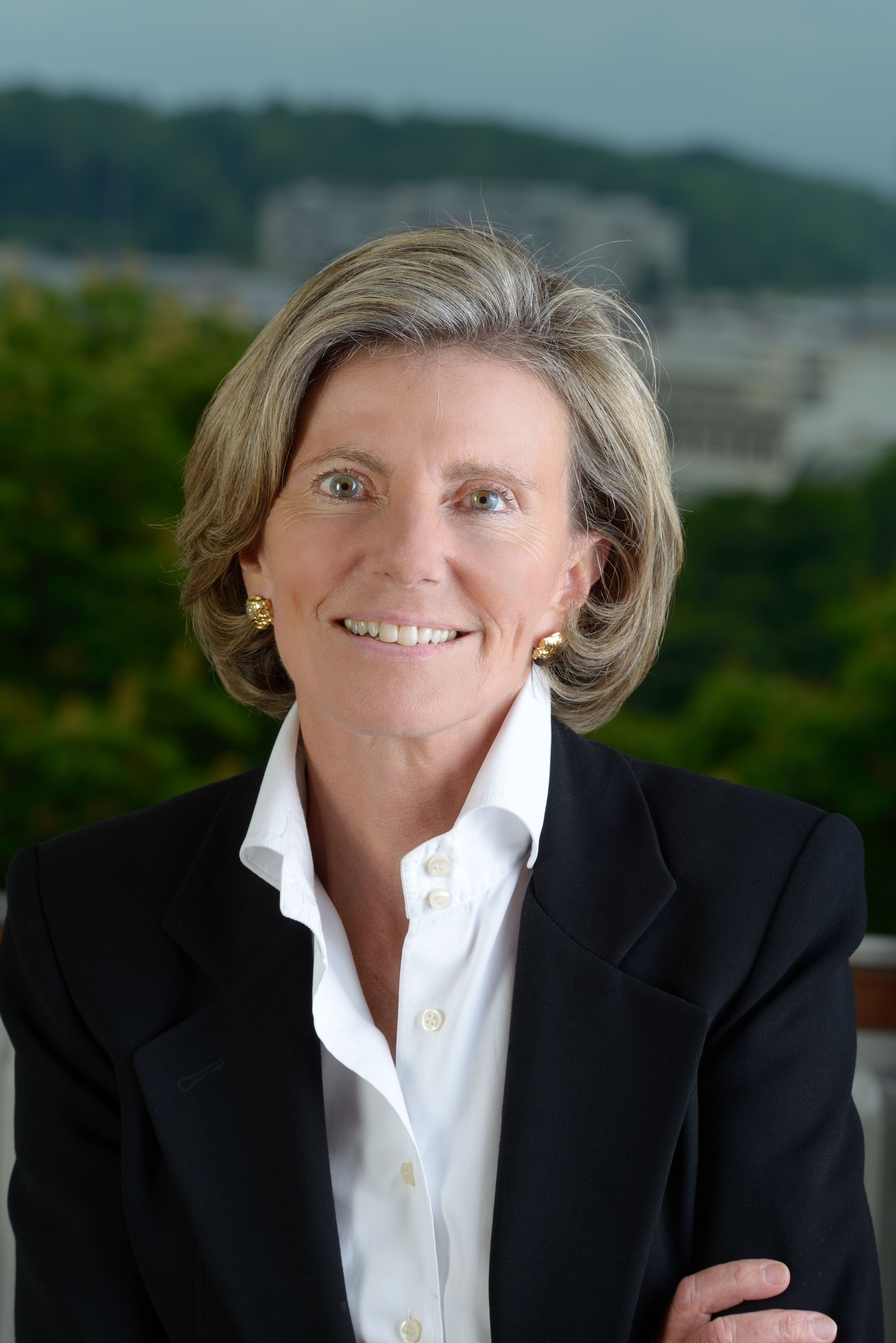 Portrait d'Isabel Rochat